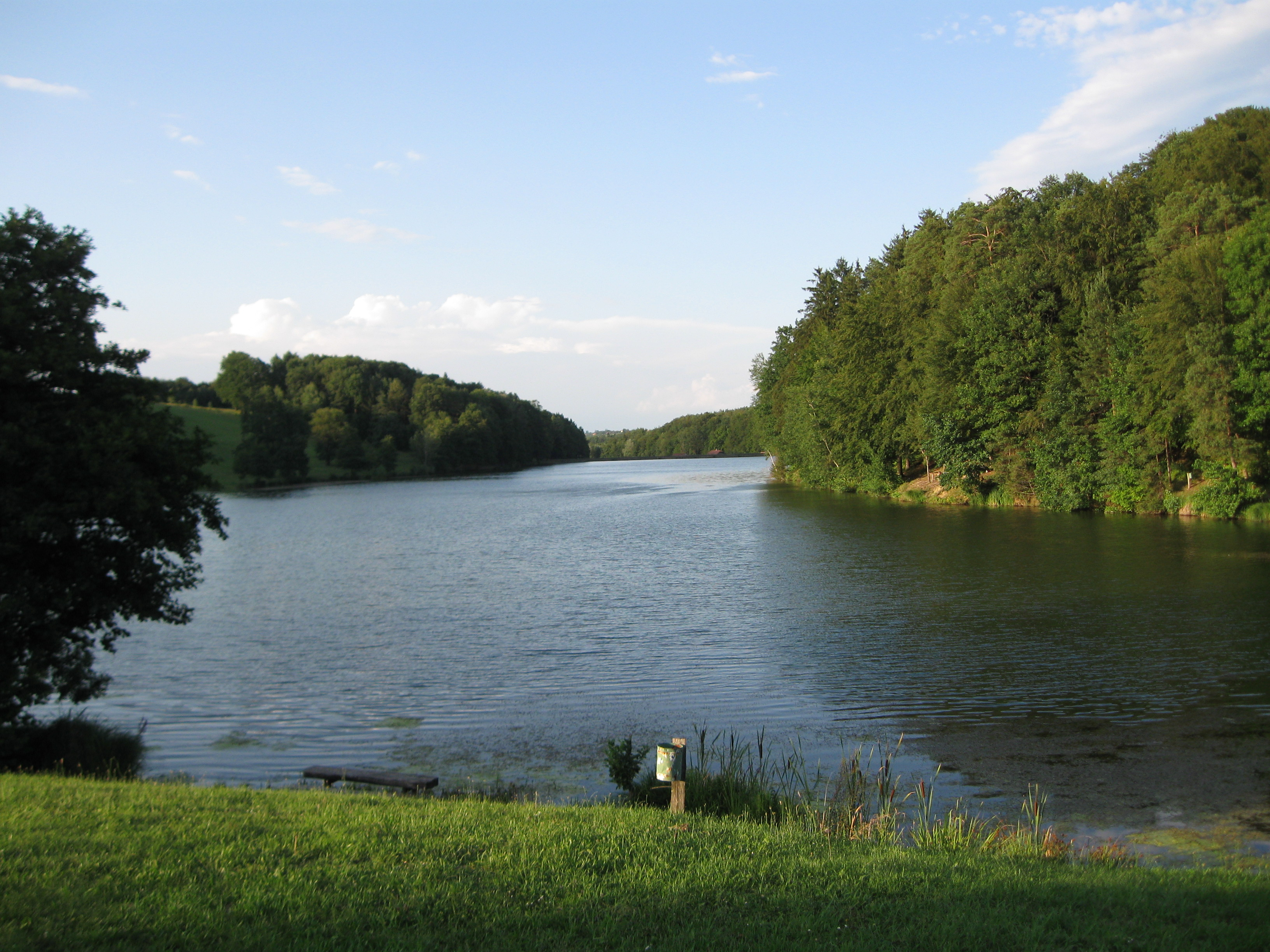 Blaguško jezero slikano iz smeri naselja Sovjak.